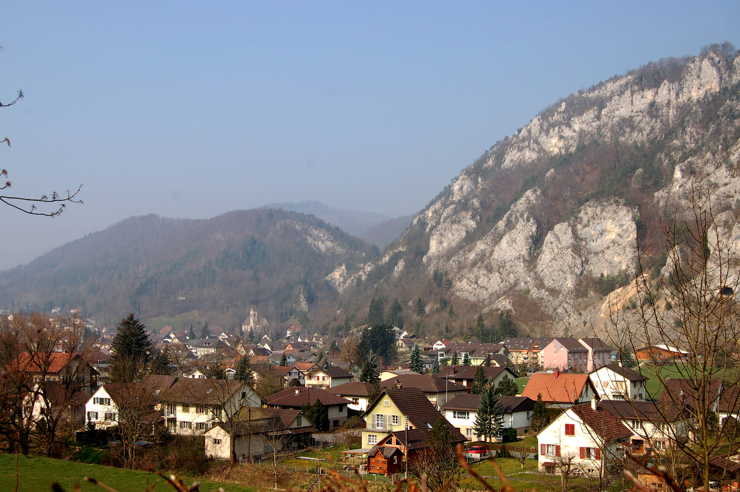 Pohled na město Balsthal v roce 2007